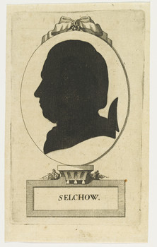 Schattenriss Prof. jur. Johann Heinrich Christian von Selchow